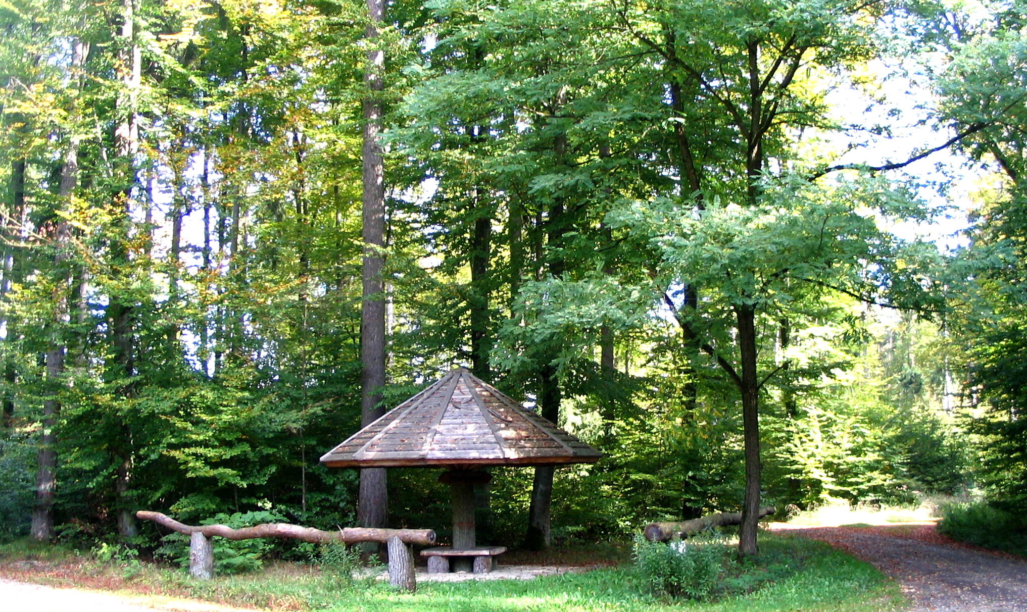 Dürnbucher Forst, Niederbayern:Rastplatz Schwammerl